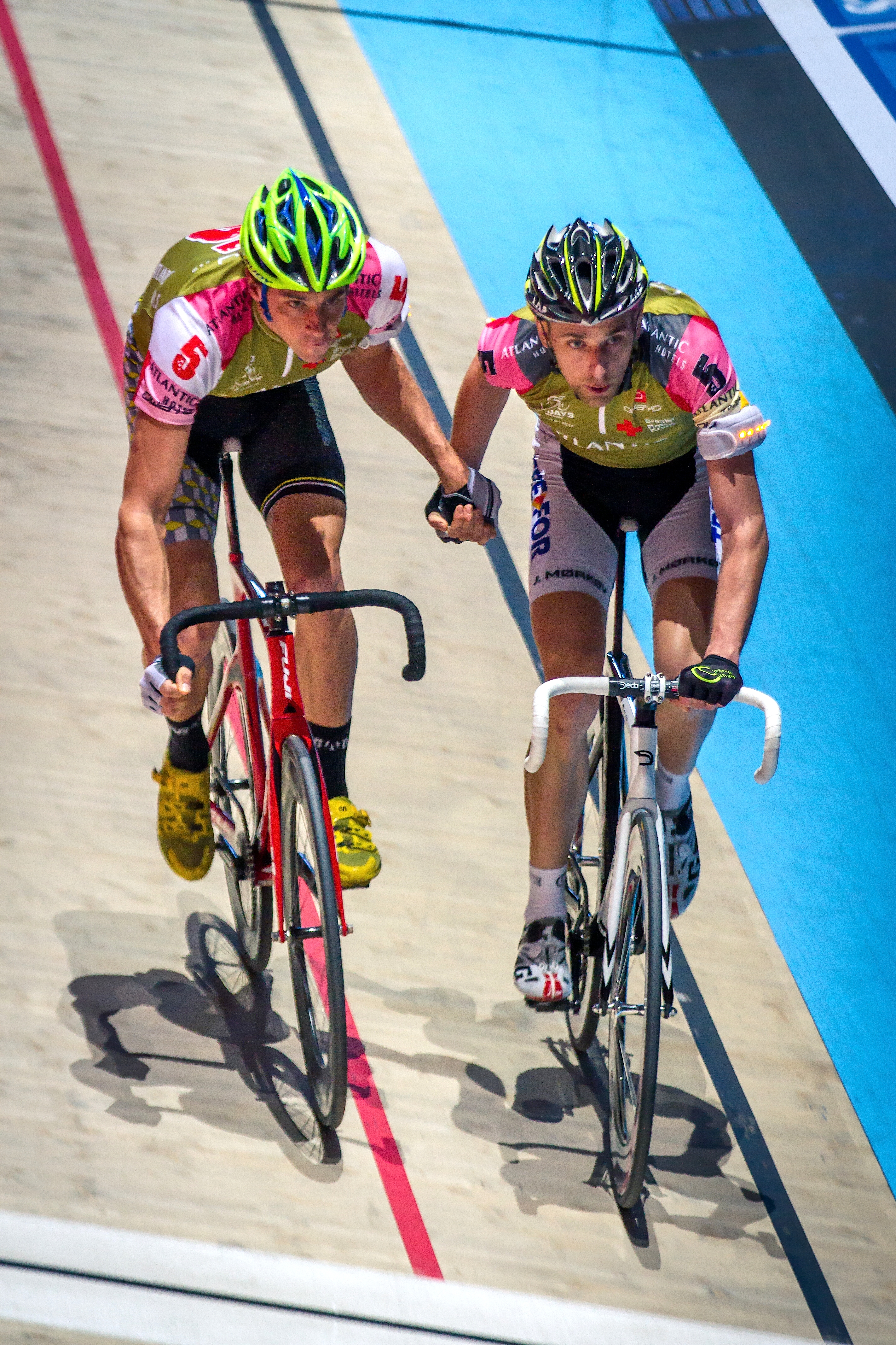 Ablösung beim Zweier-Mannschaftsfahren beim Bremer Sechstagerennen 2014 in Bremen (Deutschland): Jesper Mørkøv (links) löst Andreas Graf (rechts) ab und beschleunigt dabei mittels der Schleudergriff-Technik.